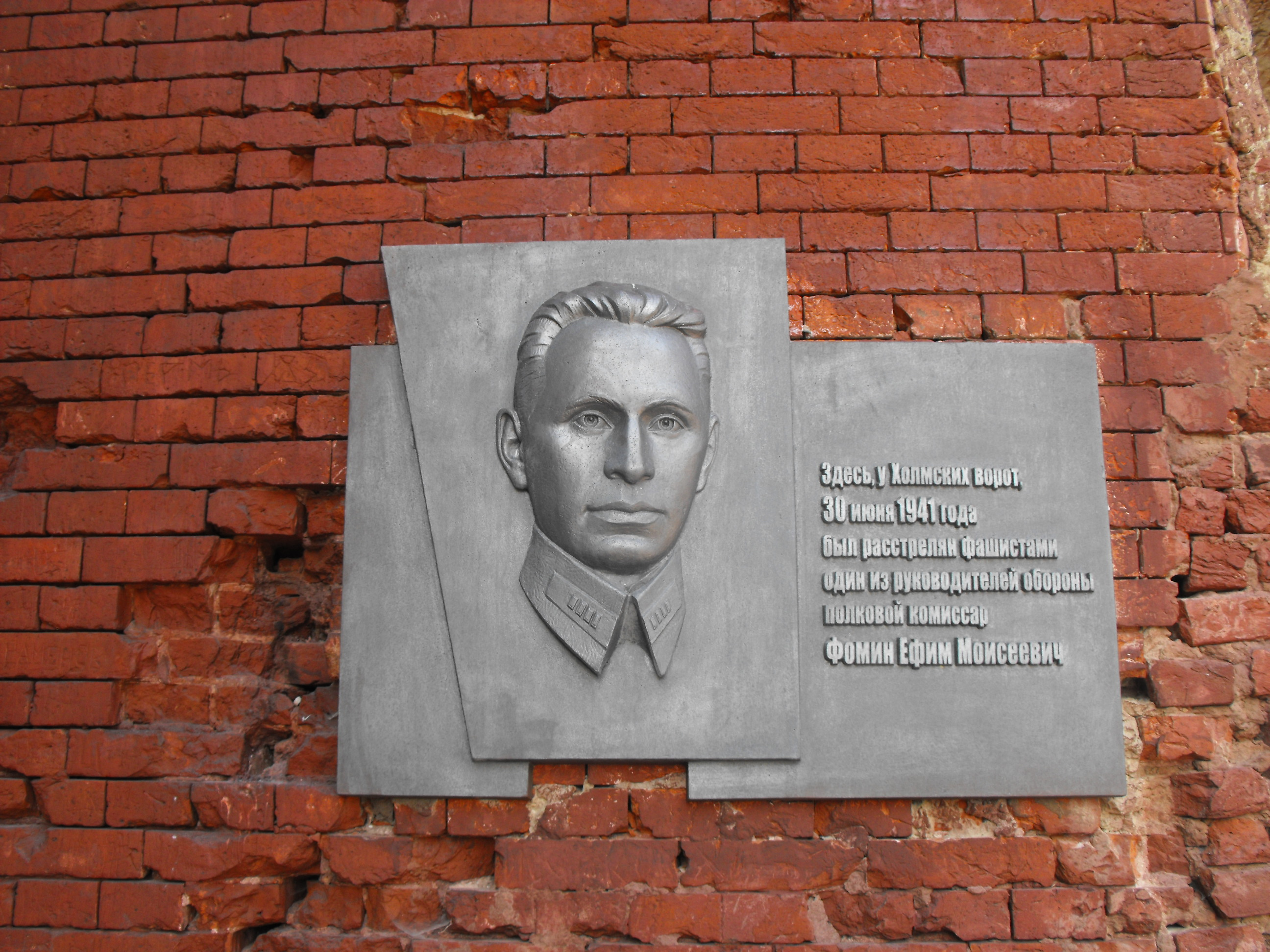 Мемориальная доска на месте расстрела полкового комиссара Фомина Ефима Моисеевича (1909-1941) - одного из руководителей обороны Брестской крепости в июне 1941 года.